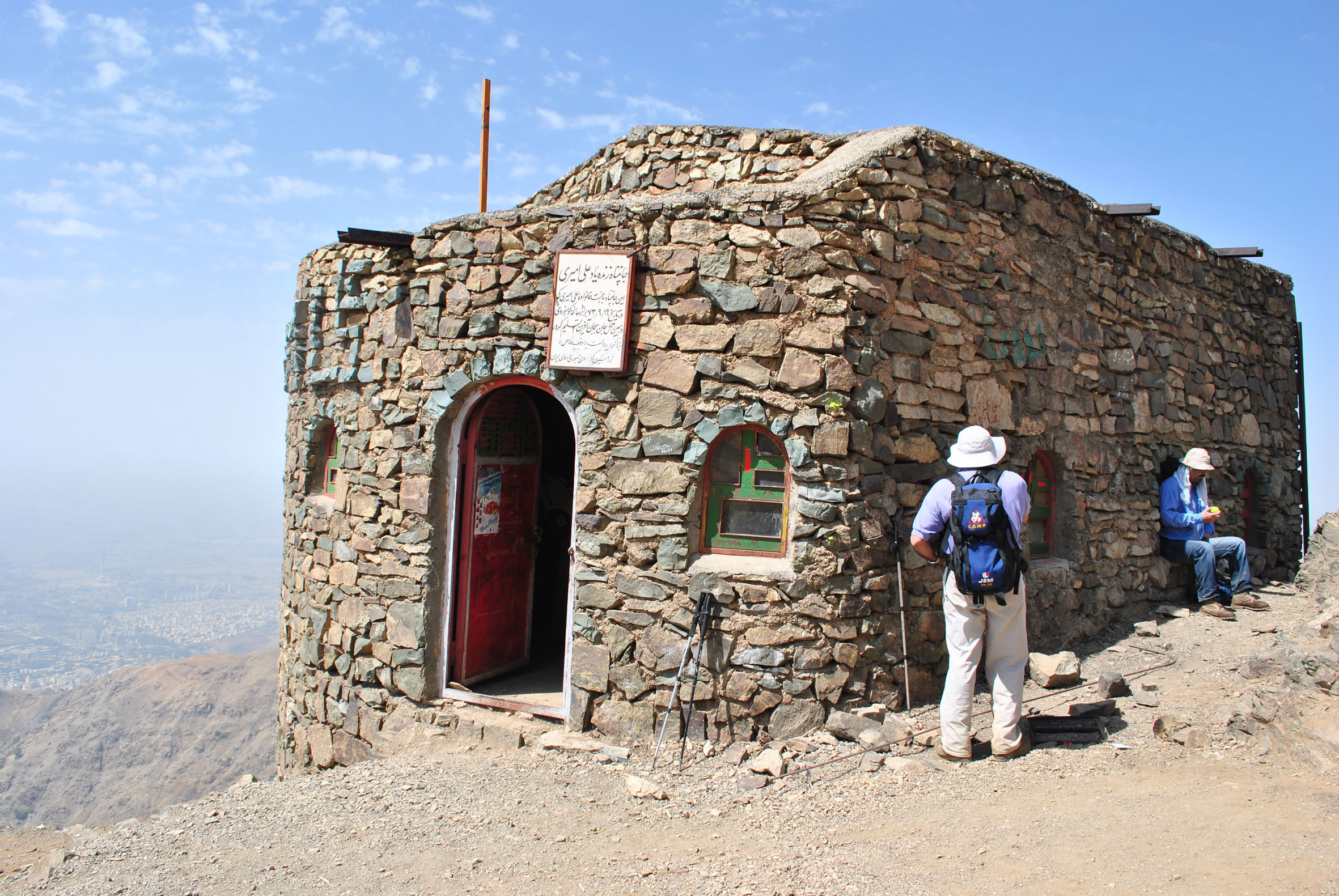 جان‌پناه سیاه‌سنگ در مسیر کوهنوردی شیرپلا به قله توچال